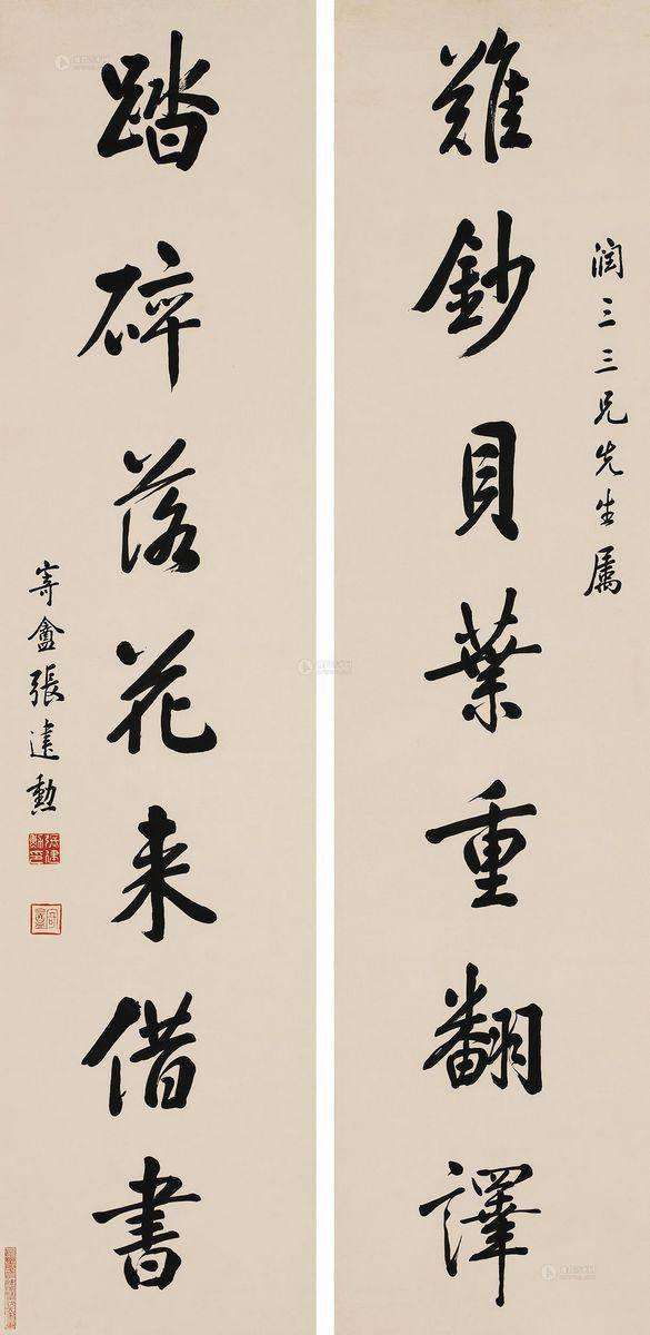 中文（中国大陆）: 张建勋对联